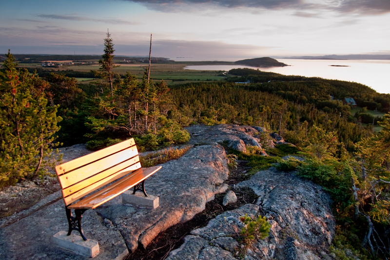 Vue du fleuve Saint-Laurent à partir du sentier des passereaux à Cacouna, au Bas-Saint-Laurent, Québec, Canada